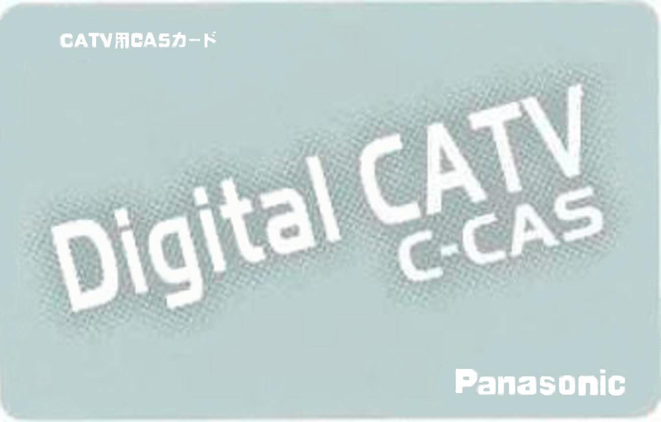 自宅にてキャナーで取り込み